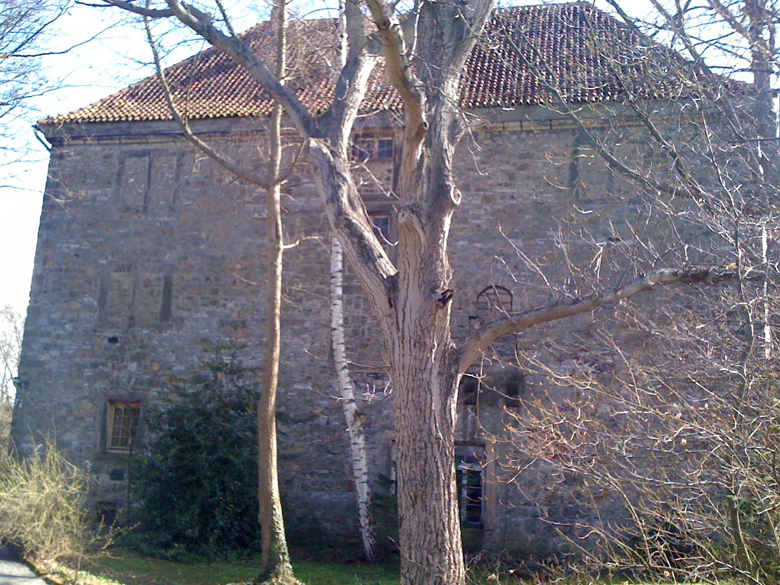 Eines von zwei Gebäuden des sog. Adelshofes oder Forstamte zu Langelsheim